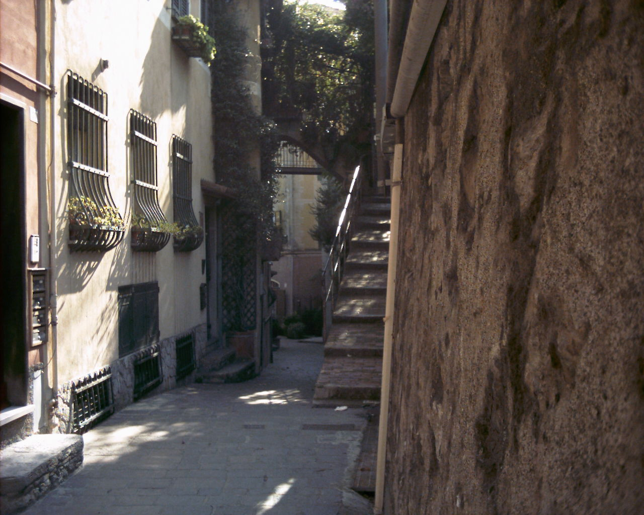 San Michele di Pagana - scorcio del centro storico